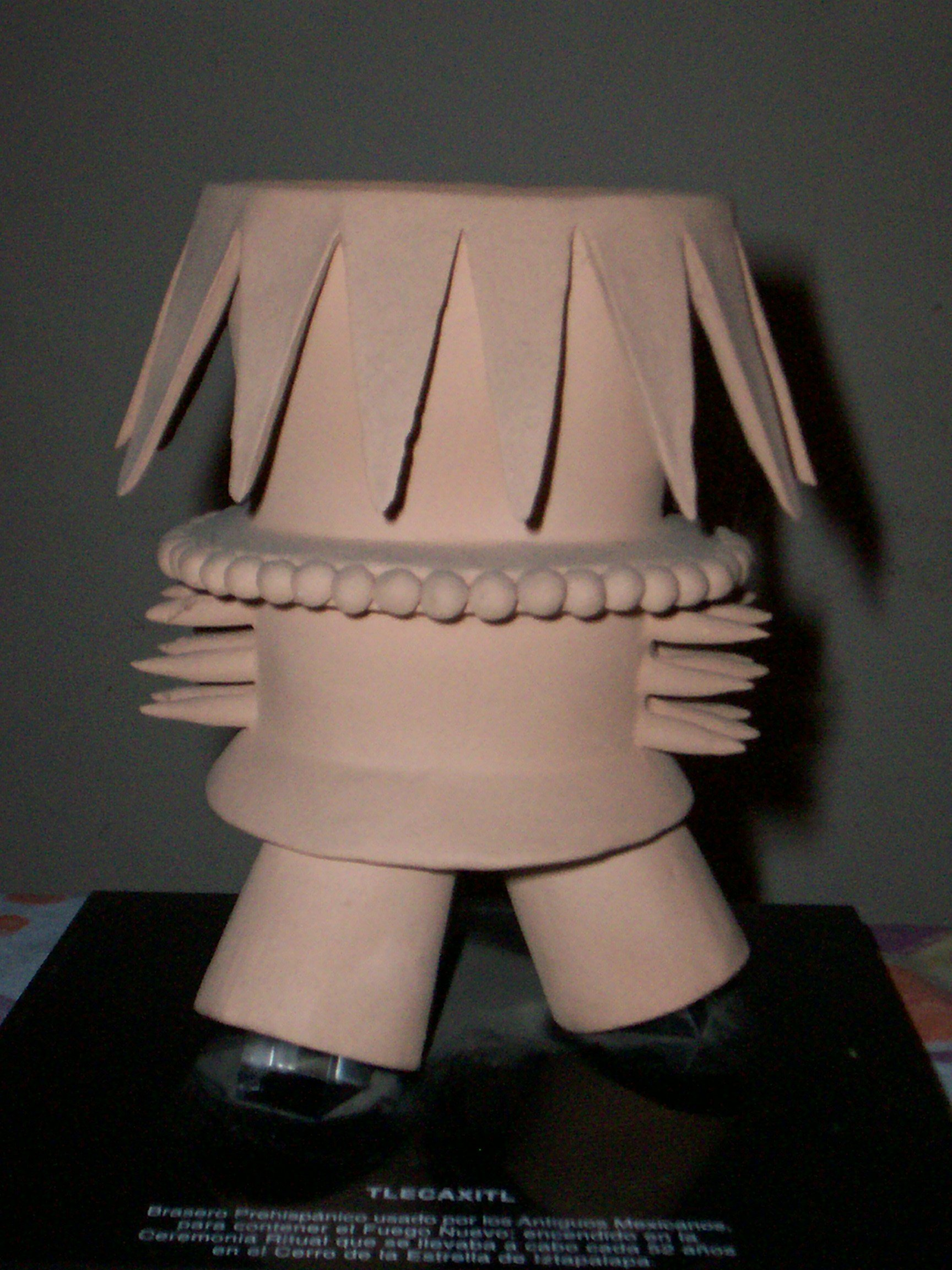 Reproducción en miniatura de un Tlecaxitl (brasero ritual azteca).